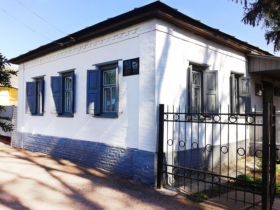 Музей Олега Кошового в Прилуках